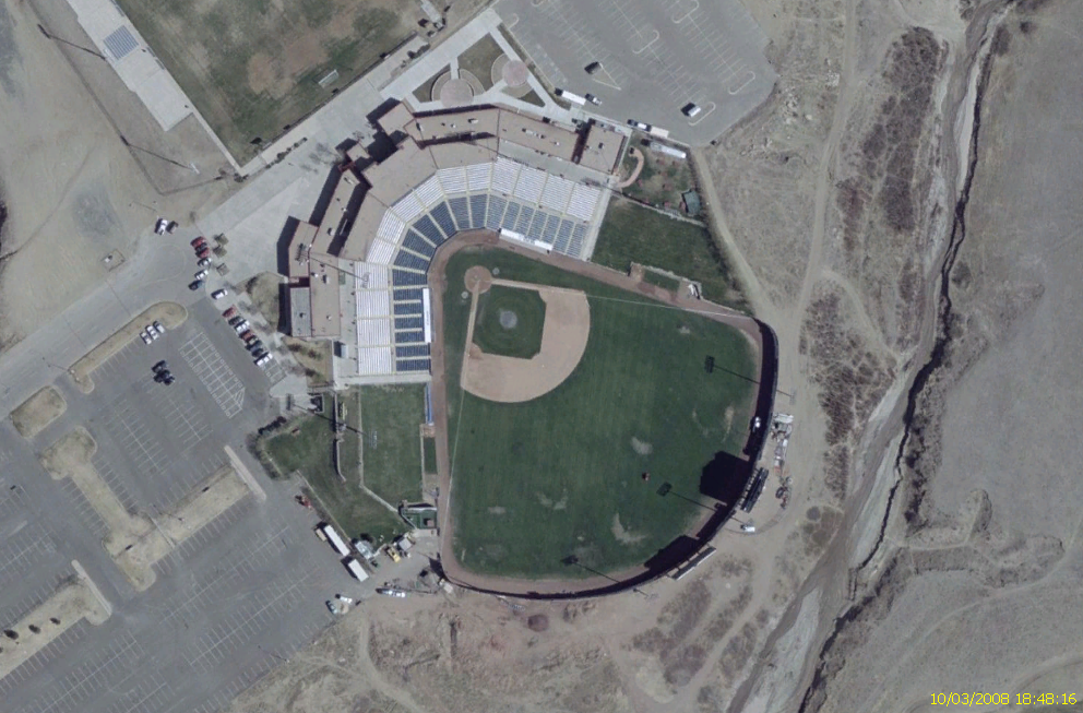 Image satellite du Security Service Field de Colorado Springs, Colorado Image provenant du logiciel NASA World Wind